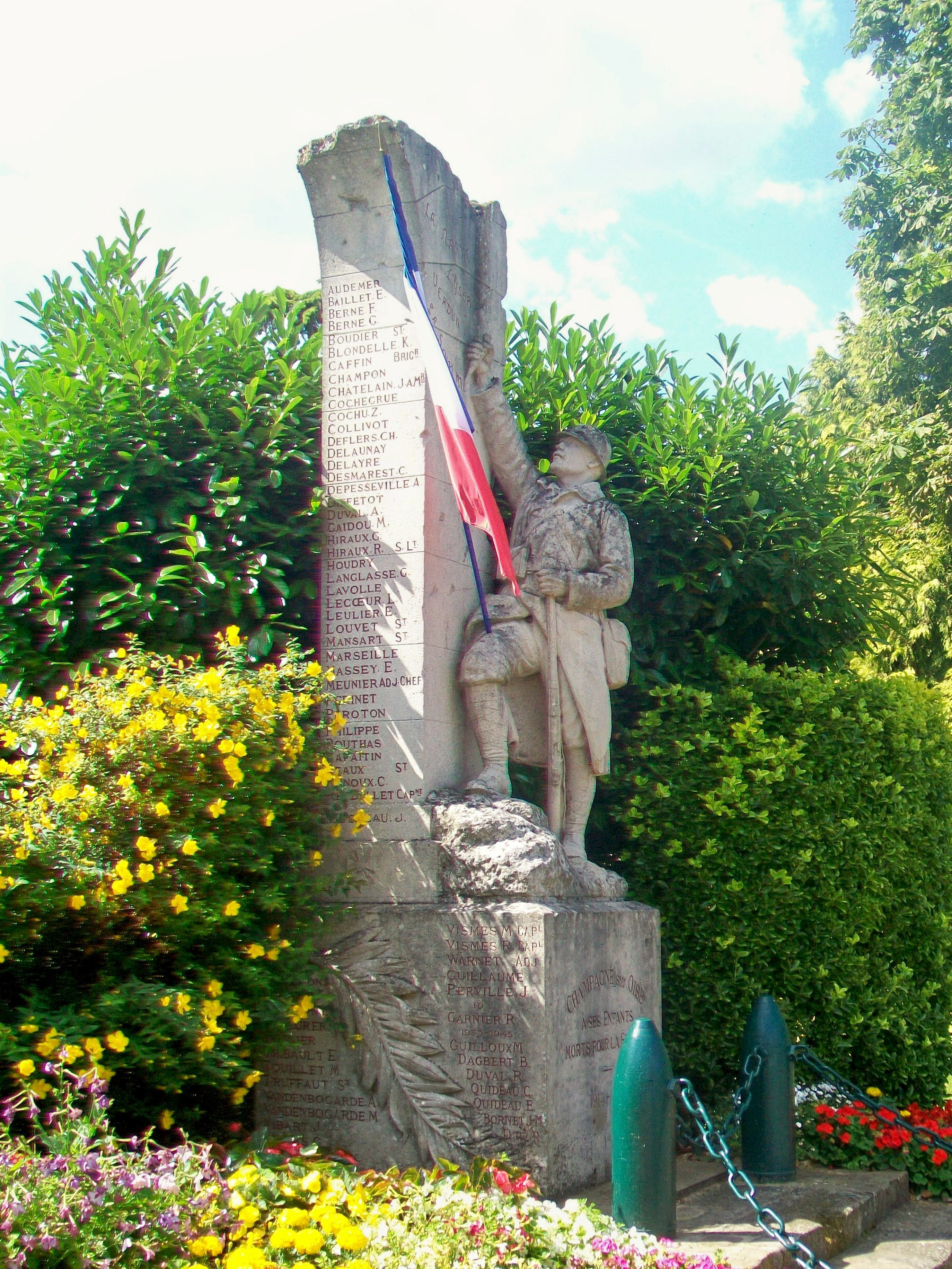 Le monument aux morts de 1922, place de général de Gaulle.